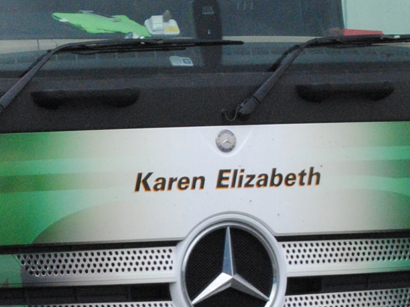 Mercedes-Benz MP4 Actros (H8651 Karen Elizabeth). seen here in Widnes